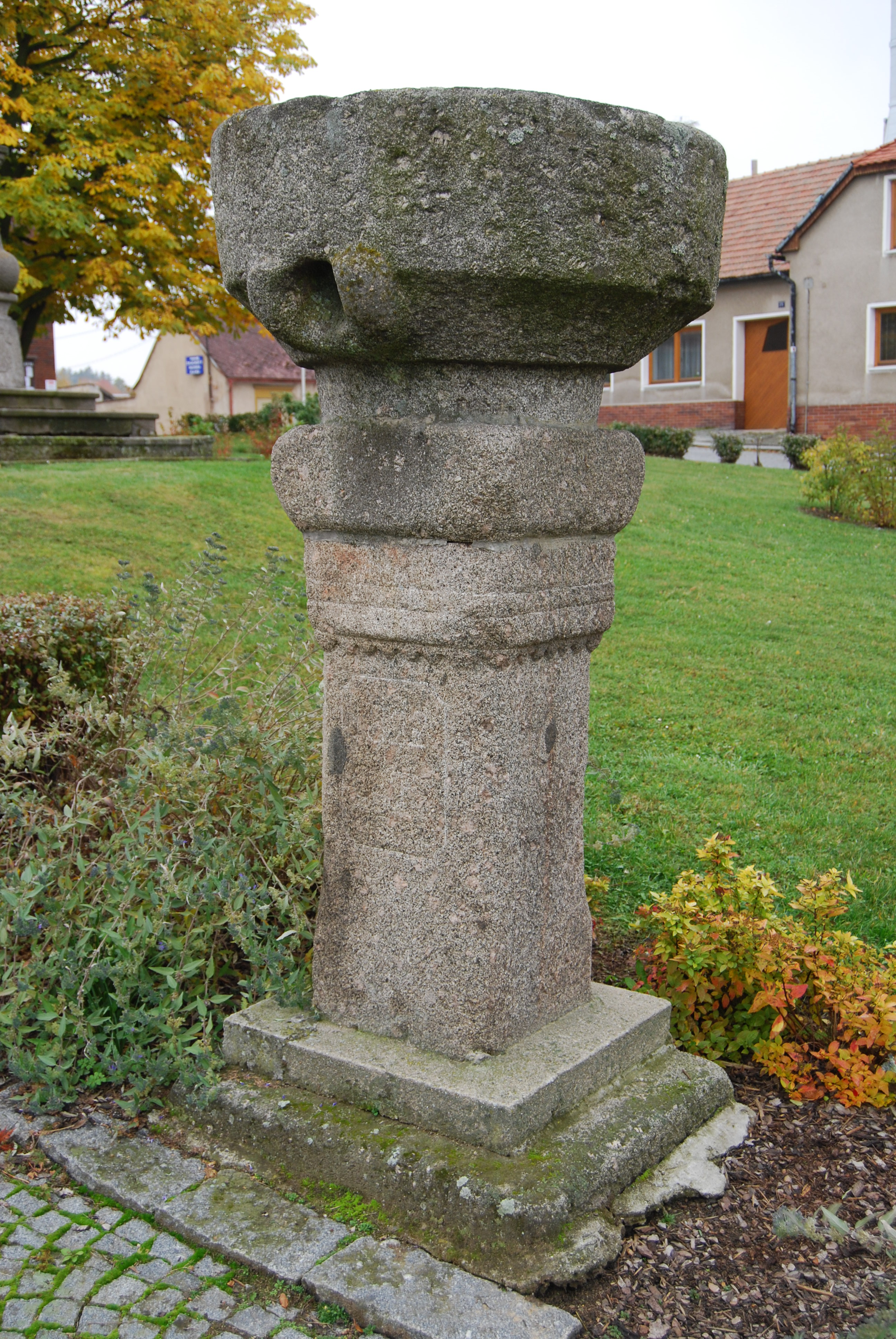 Kamenný korec na náměstí. Krásná Hora nad Vltavou. Okres Příbram. Česká republika.